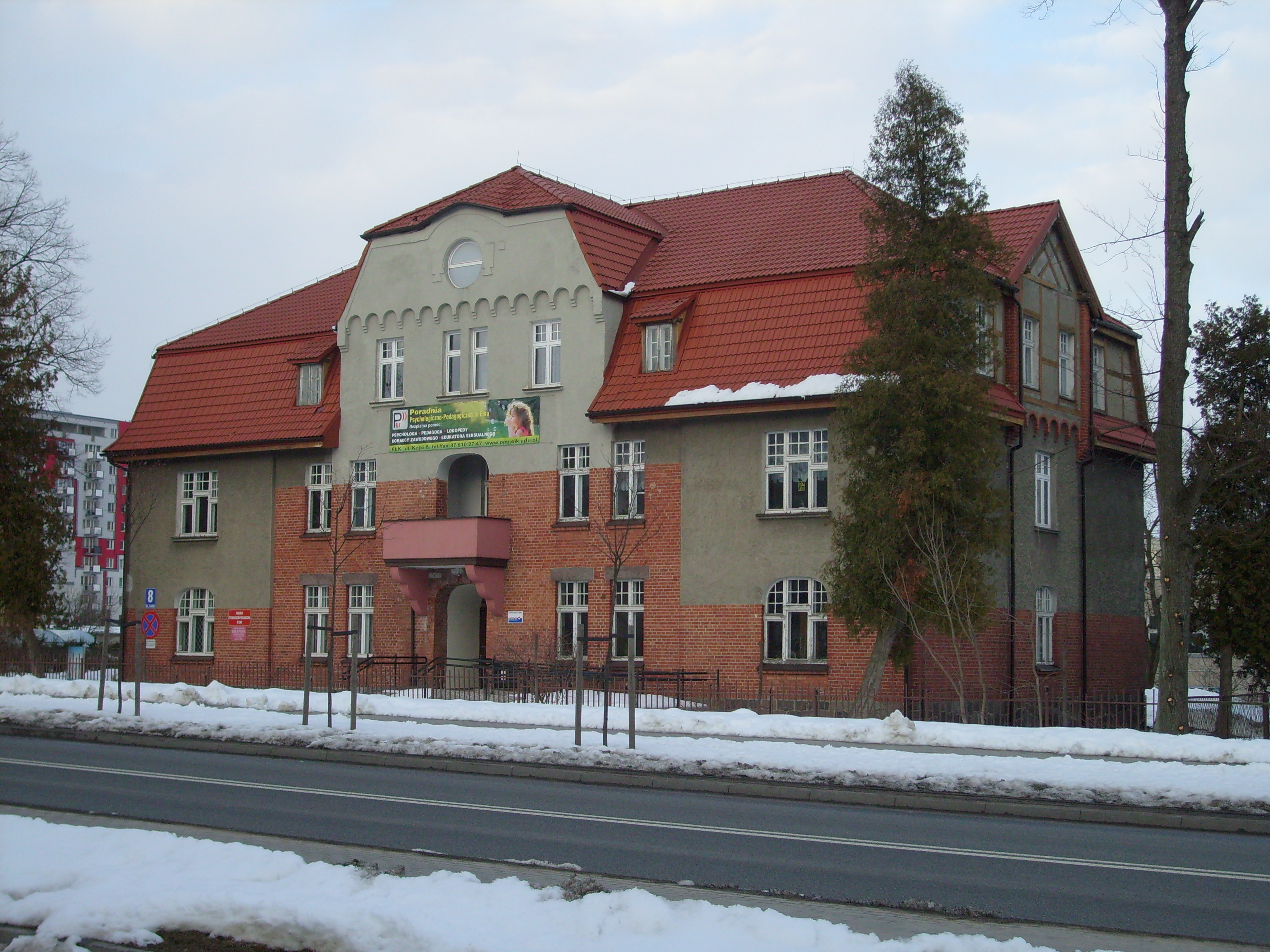 Budynek Poradni Psychologiczno-Pedagogicznej w Ełku, stan na kwiecień 2013